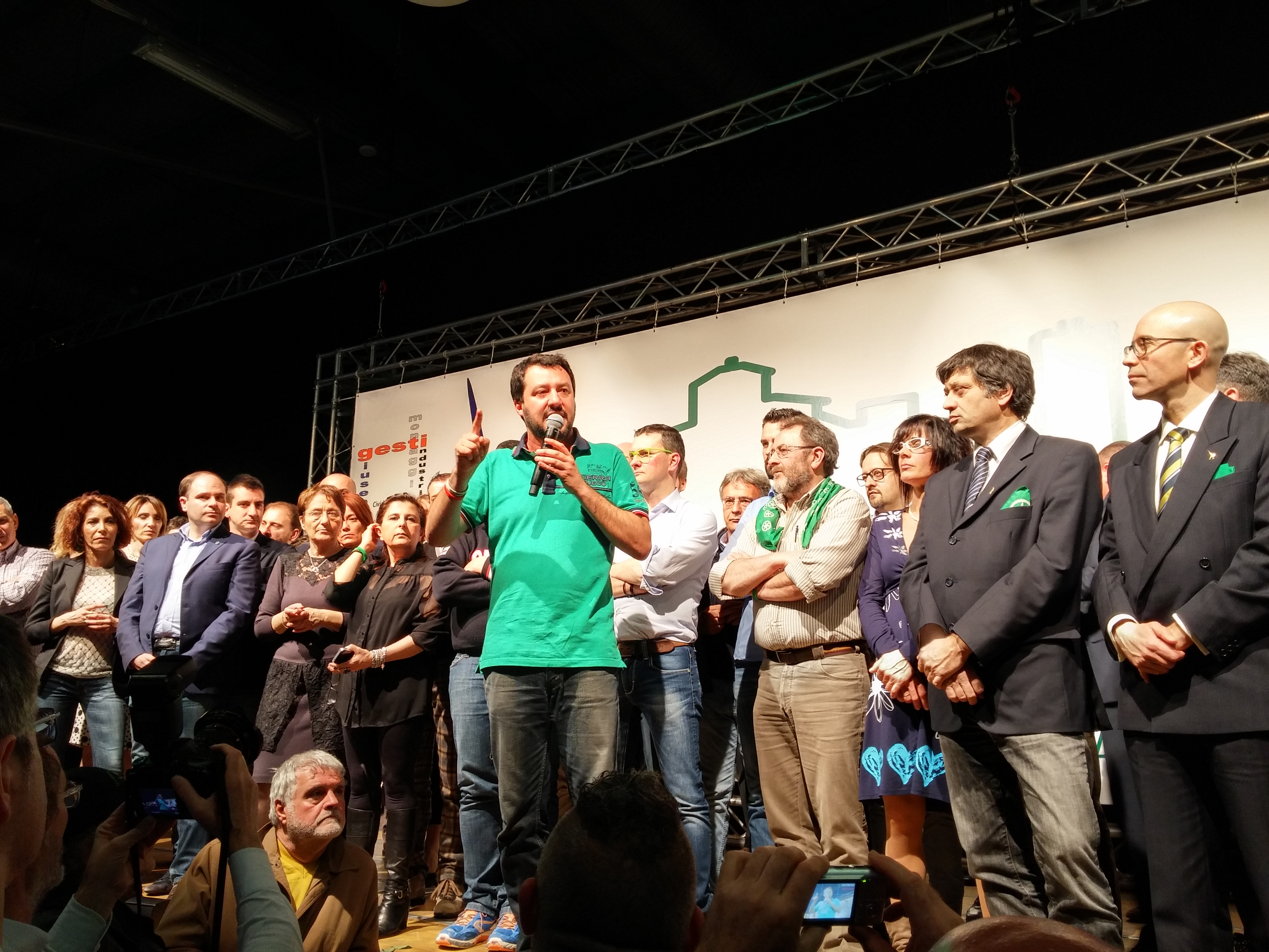 Discorso di Matteo Salvini alla cena di gala per il 30° anniversario della Lega Nord in provincia di Bergamo.